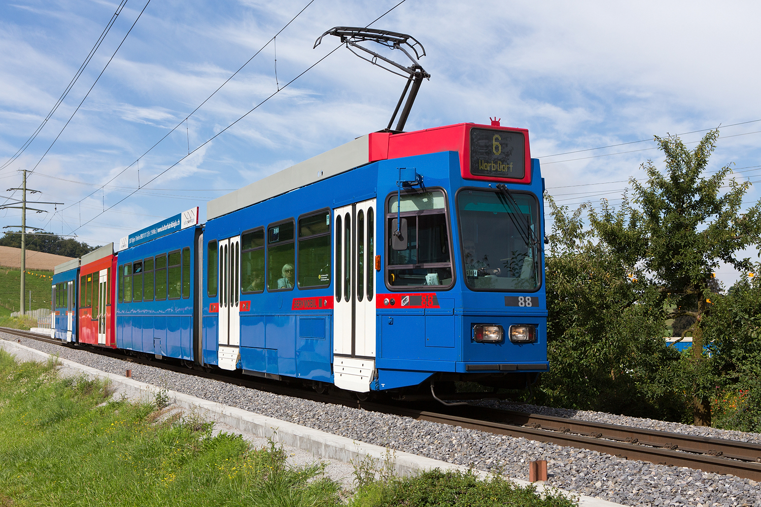 's Blaue Bähnli bei der Einfahrt in Worb (Linie 6 von Bernmobil)